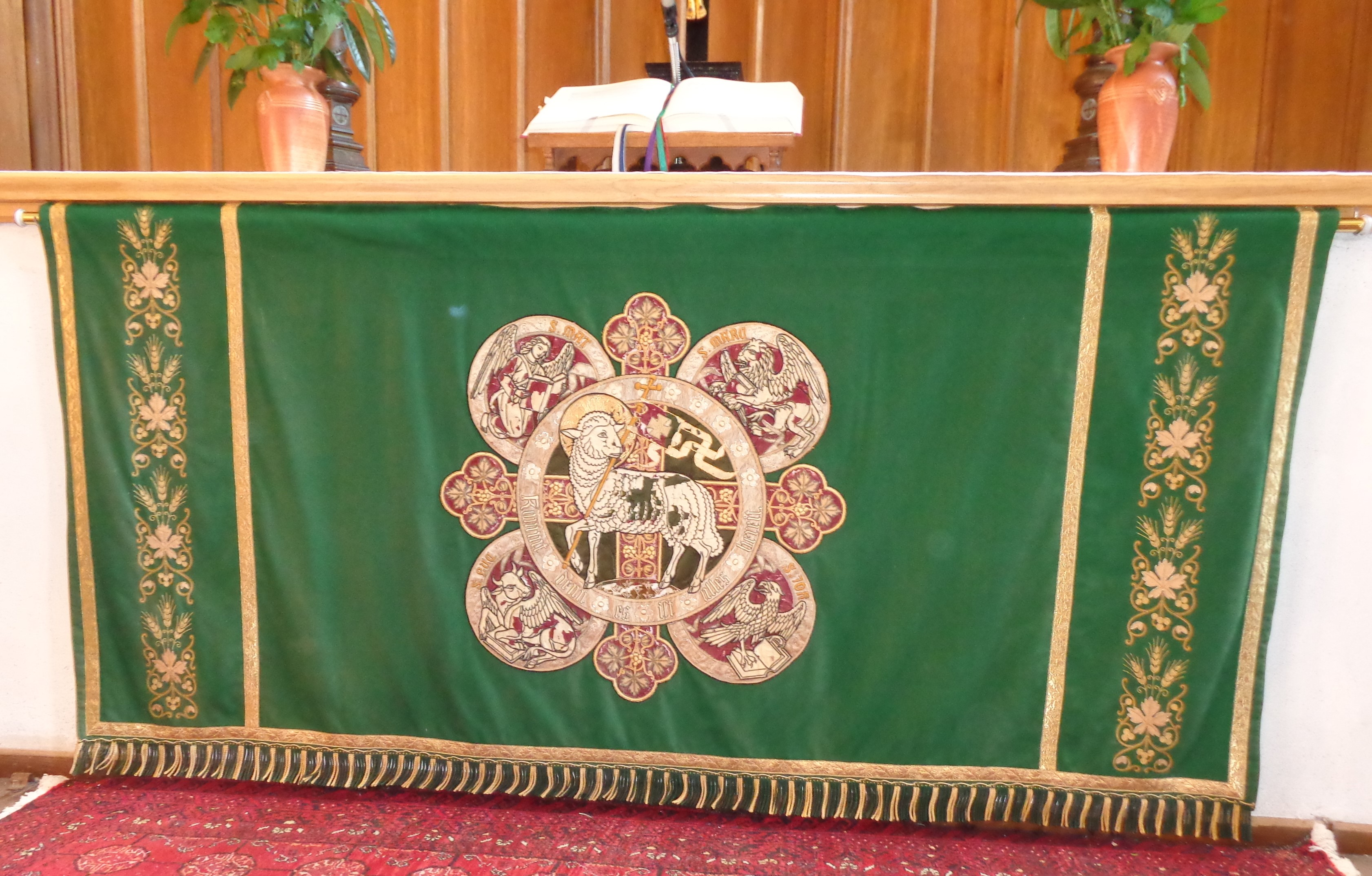 Antependium in der liturgischen Farbe Grün, St. Marien Plau am See; gestickt 1901/1902 von Diakonissen im Stift Bethlehem